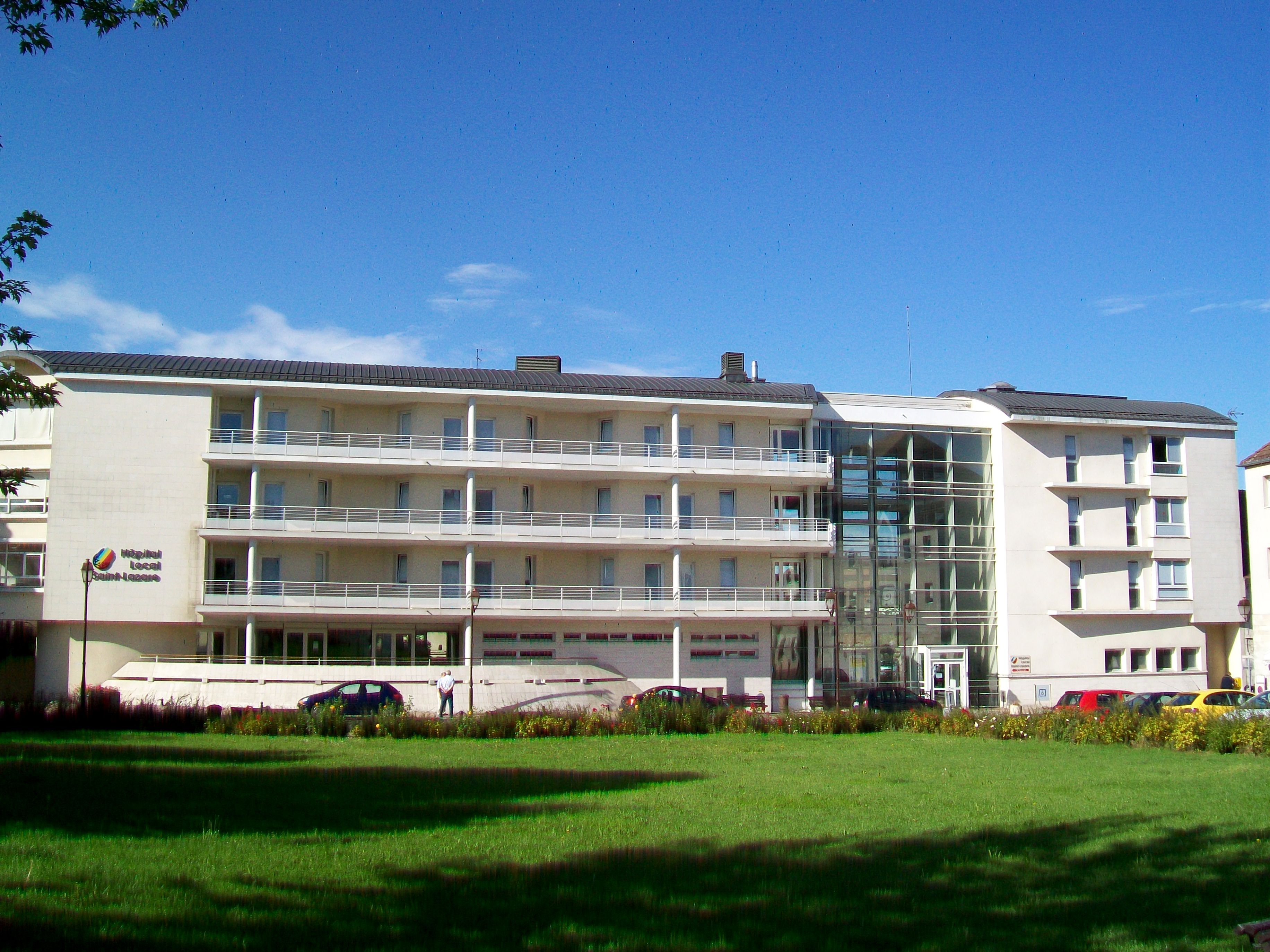 L'hôpital local Saint-Lazare, rue Saint-Lazare.